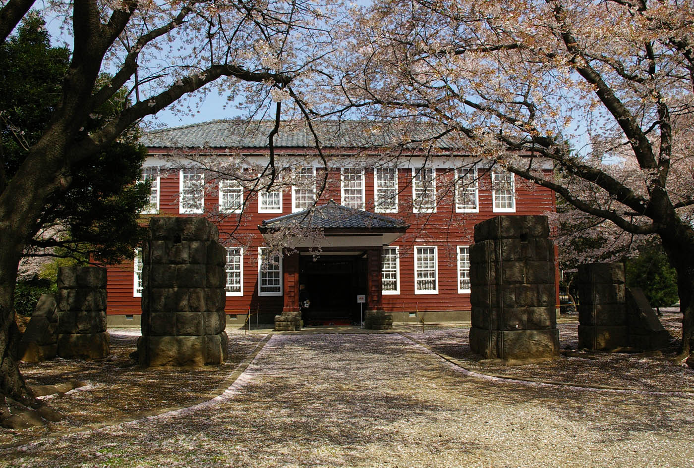 Taken by los688,5-Apr-2008,JGSDF Camp Asaka.PD-self. ja:2008年4月5日、投稿者撮影。陸上自衛隊朝霞駐屯地、振武台記念館。